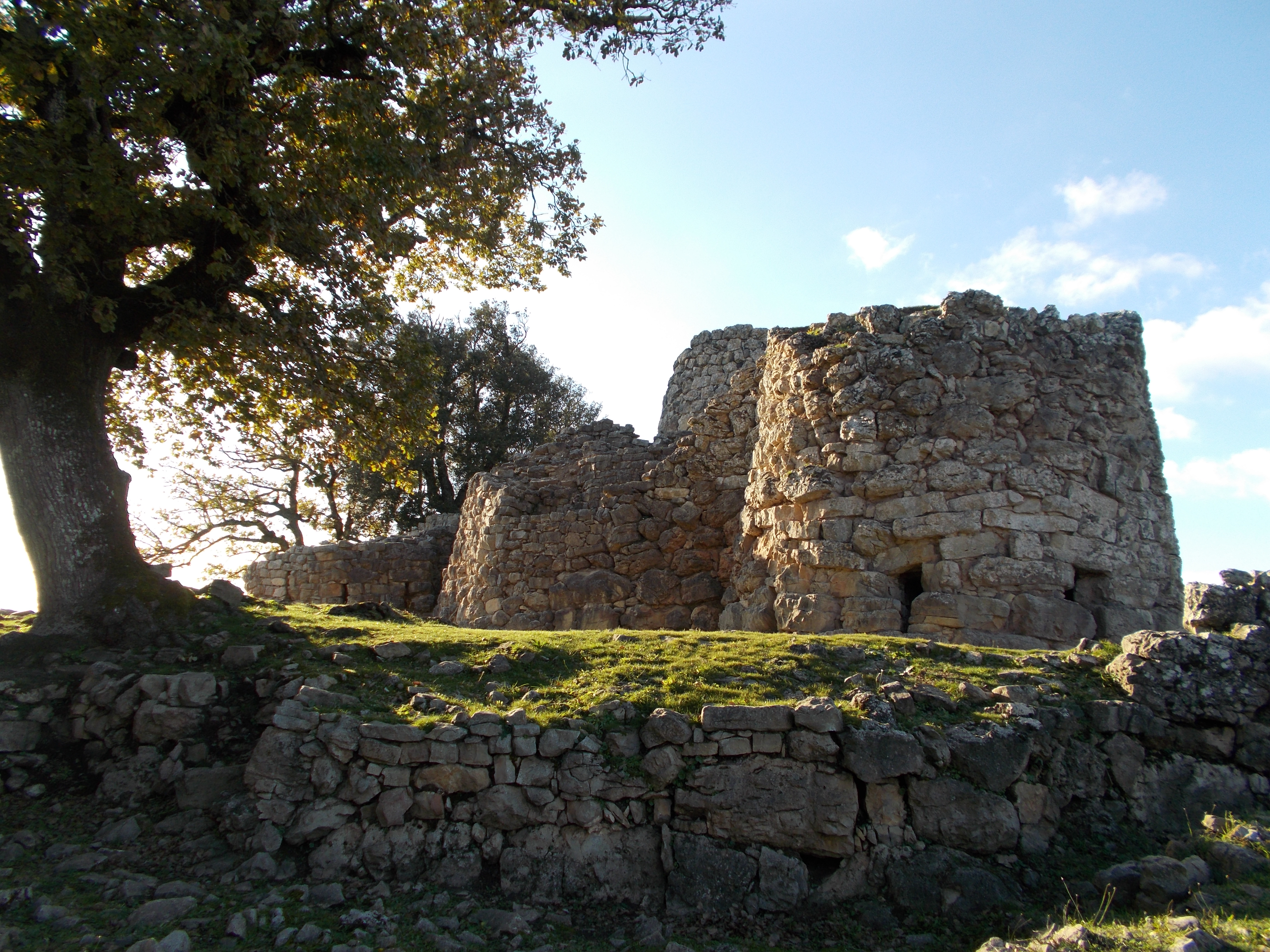 Nuraghe Adoni - MIBAC Il complesso archeologico, costituito da un nuraghe quadrilobato e da un villaggio, è ubicato su un rilievo a oltre 800 m s.l.m. in un’area suggestiva dal punto di vista naturalistico, caratterizzata dalla presenza di querce plurisecolari. La straordinaria posizione geografica consente al visitatore di spaziare con lo sguardo su ampi tratti del territorio circostante. In primo piano l'antemurale lungo il lato Est, a sinistra una quercia nata sull'antemurale. This is a photo of a monument which is part of cultural heritage of Italy.